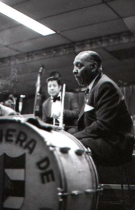 Consejo Valiente Roberts más conocido como "Acerina" (lado derecho de la imagen)